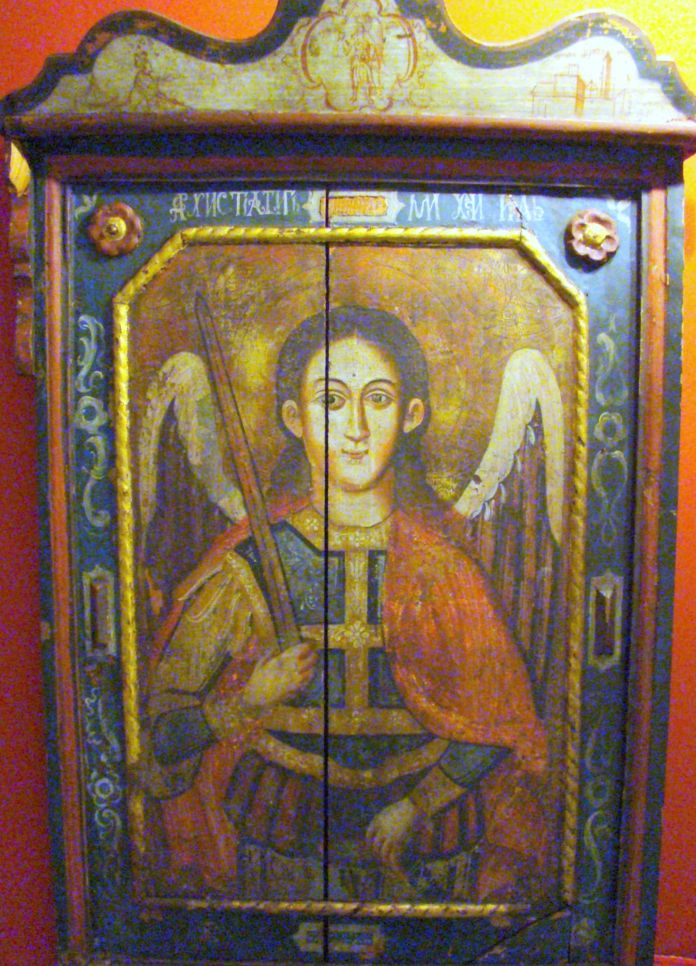 Icoană care a aparținul bisericii din Prundu Bârgăului